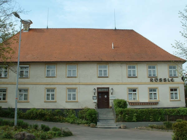 Achstetten, country inn Rössle